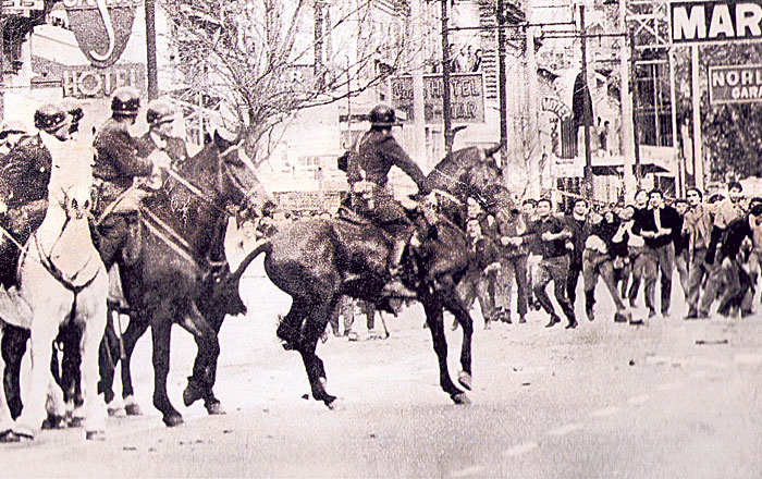 Los policías retroceden ante la carga de los cordobeses que salieron a las calles a luchar por defender conquistas laborales como el "Sábado inglés".